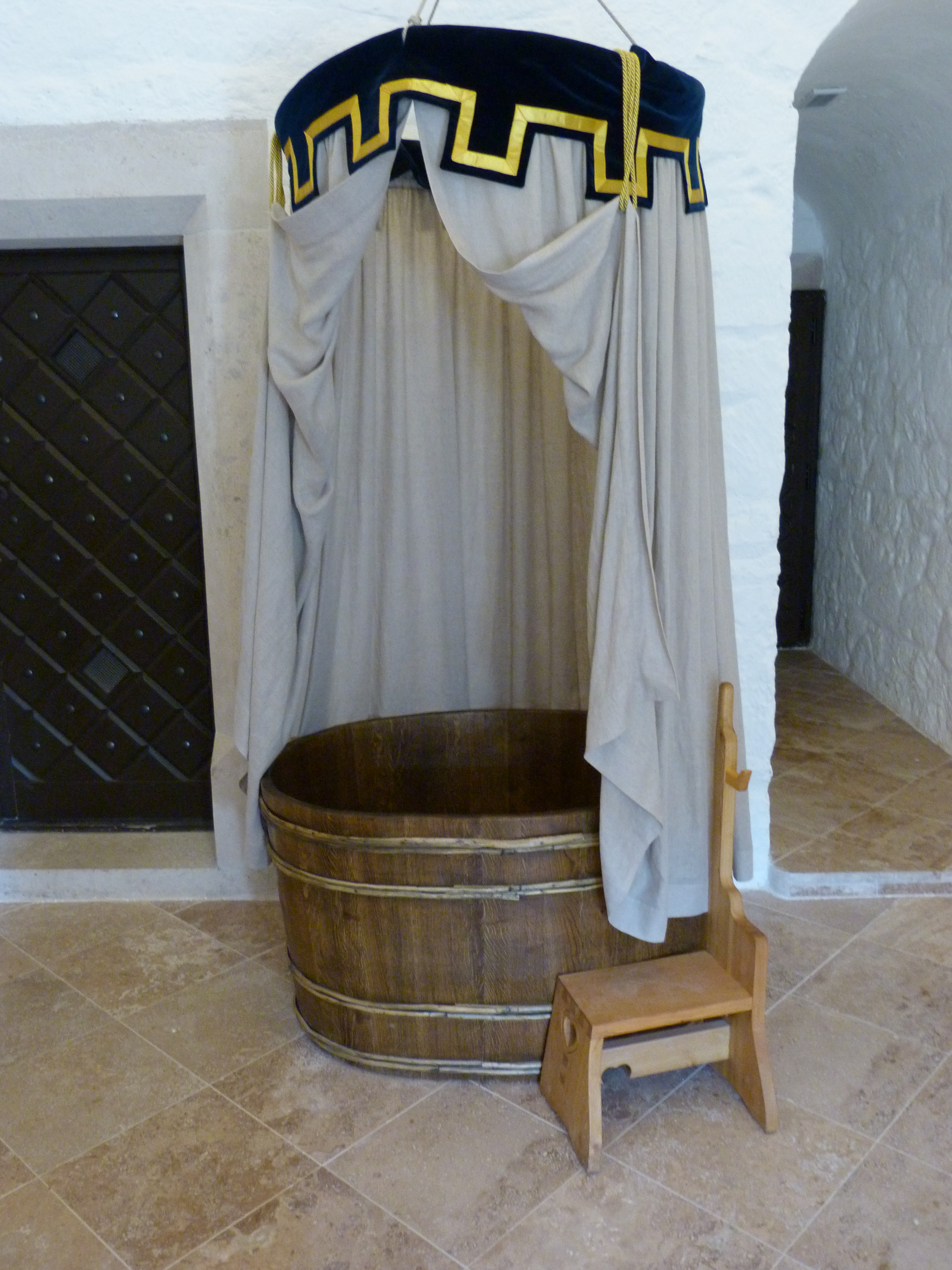 A felvétel 2015. február 7-én szombaton készült Diósgyőr Várában. ©© Derzsi Elekes Andor, Budapest, 2015, A fénykép másolását és felhasználását a szerző ellenérték nélkül, jogutódjaira is kihatóan megengedi. Az engedély kiterjed a kereskedelmi célú hasznosításra is. Kéri azonban nevének feltüntetését a felhasználás során. A Metapolisz sorozat valamennyi képe és filmje Creative Commons alatti valamint kereskedelmi - for profit - célra is felhasználható. Ajánlott hivatkozás: Derzsi Elekes Andor: Metapolisz DVD line